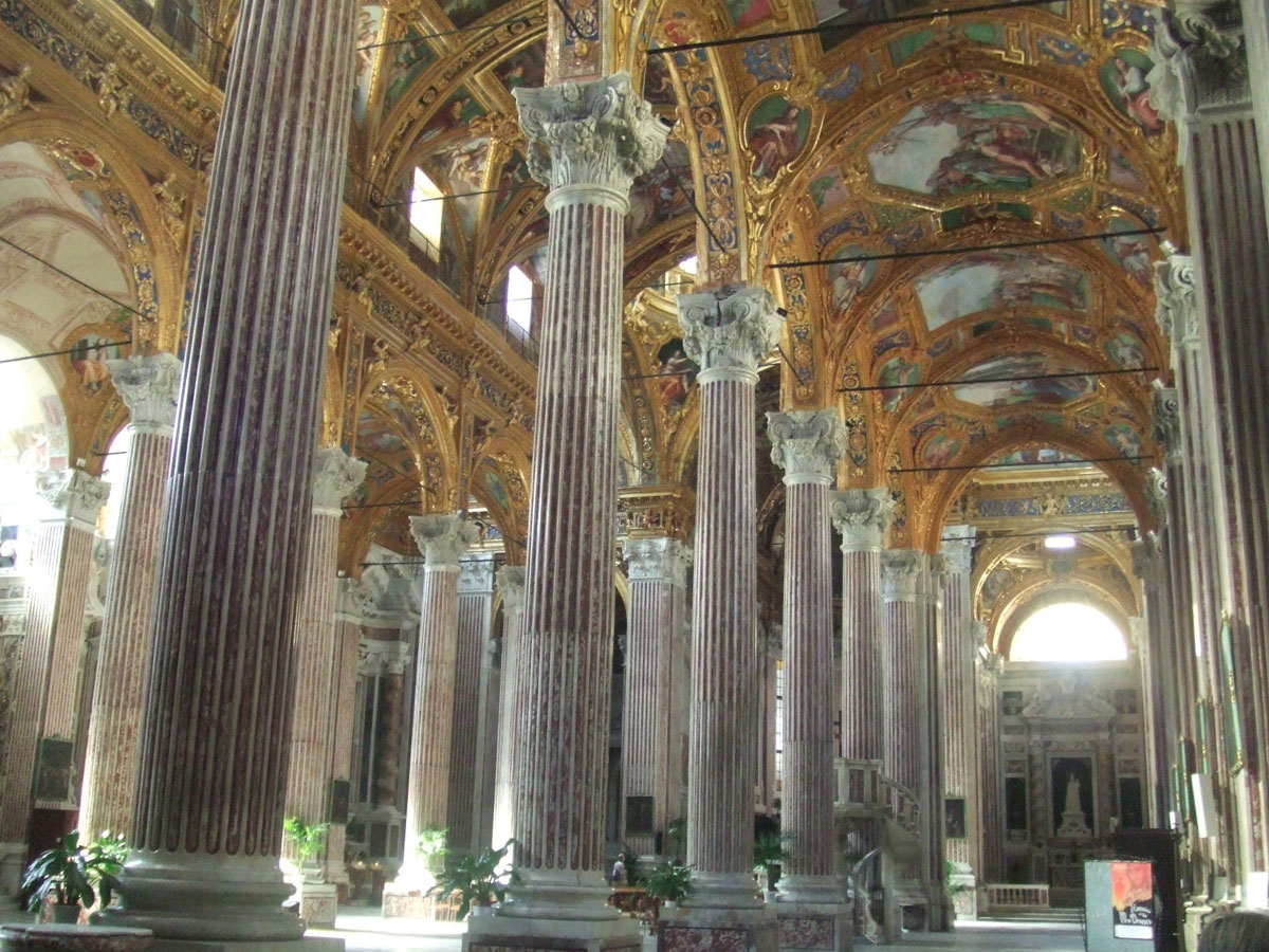 Église de la Basilica della Santissima Annunziata del Vastato de Gênes (Ligurie)